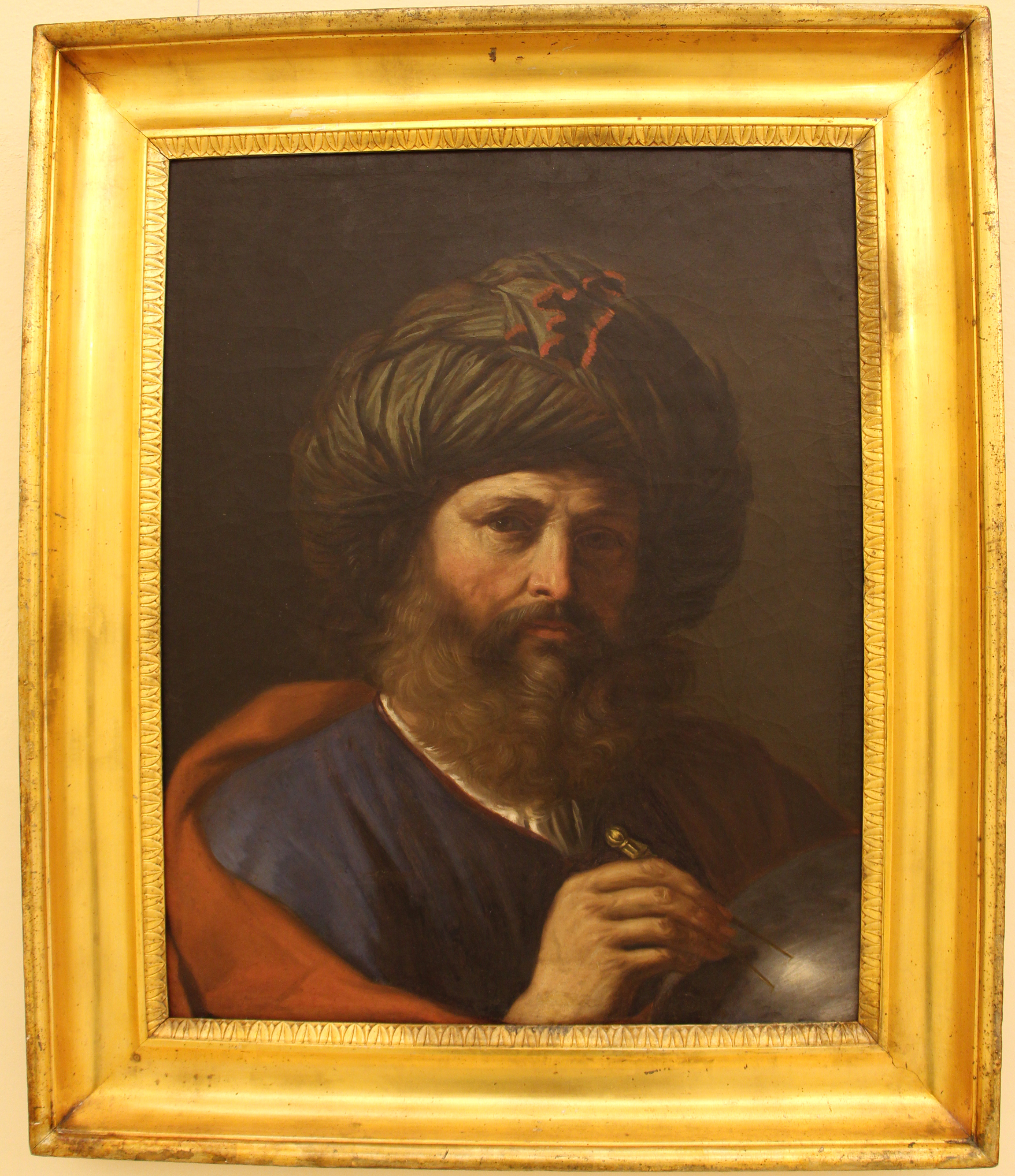 Pinacoteca Mus'a al Canopoleno - MIBAC The making of this document was supported by Wikimedia CH. (Submit your project!) For all the files concerned, please see the category Supported by Wikimedia CH. This is a photo of a monument which is part of cultural heritage of Italy.